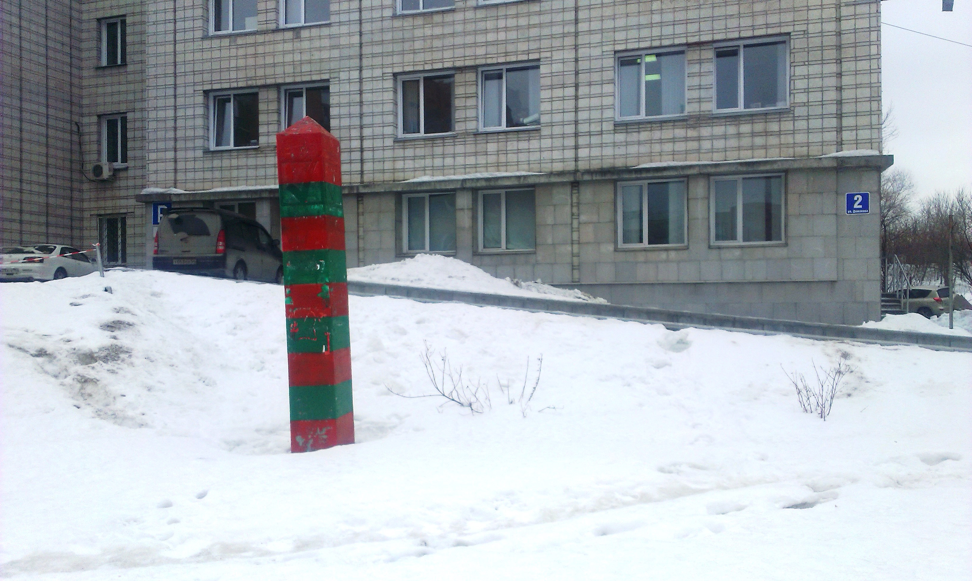 Улица Демакова. Столб депутата Агафонова